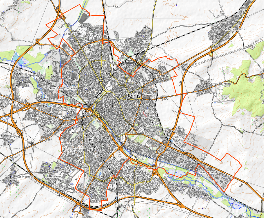 carte réalisée sur umap This map may be incomplete, and may contain errors. Don't rely solely on it for navigation.